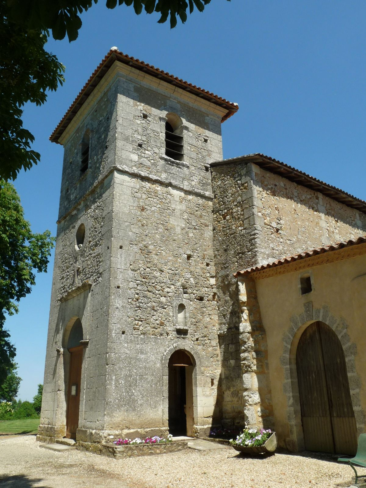 église de Parcoul, Dordogne, France